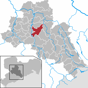 Rossau in Saxony - district Mittelsachsen